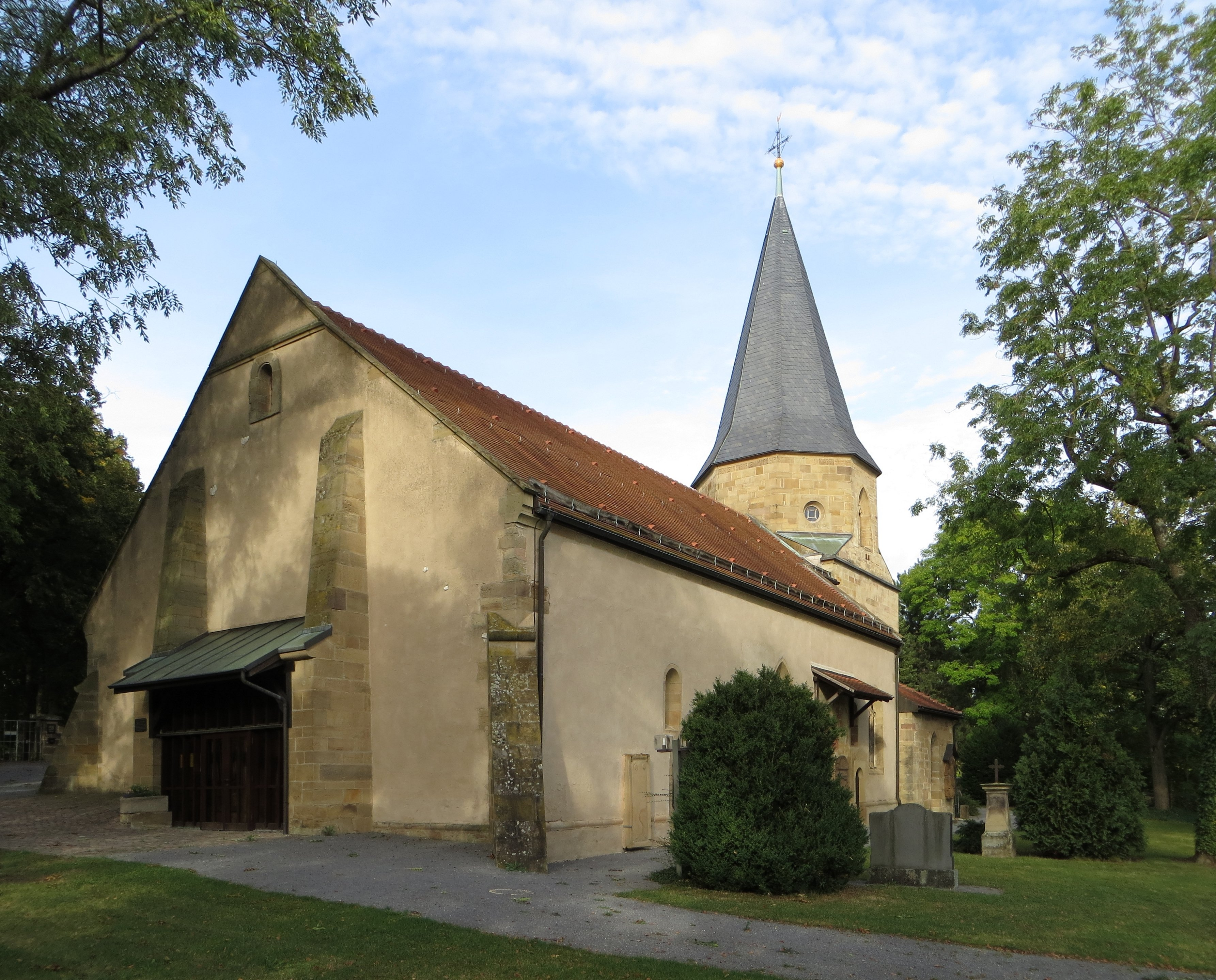 Die Johanniskirche auf dem Brackenheimer Friedhof von Südwesten